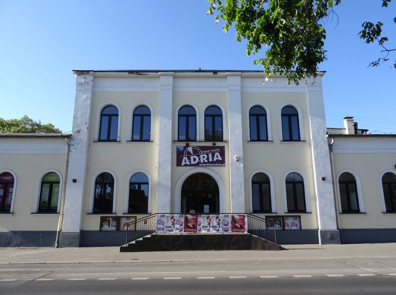 Kinoteatr Adria w Bydgoszczy